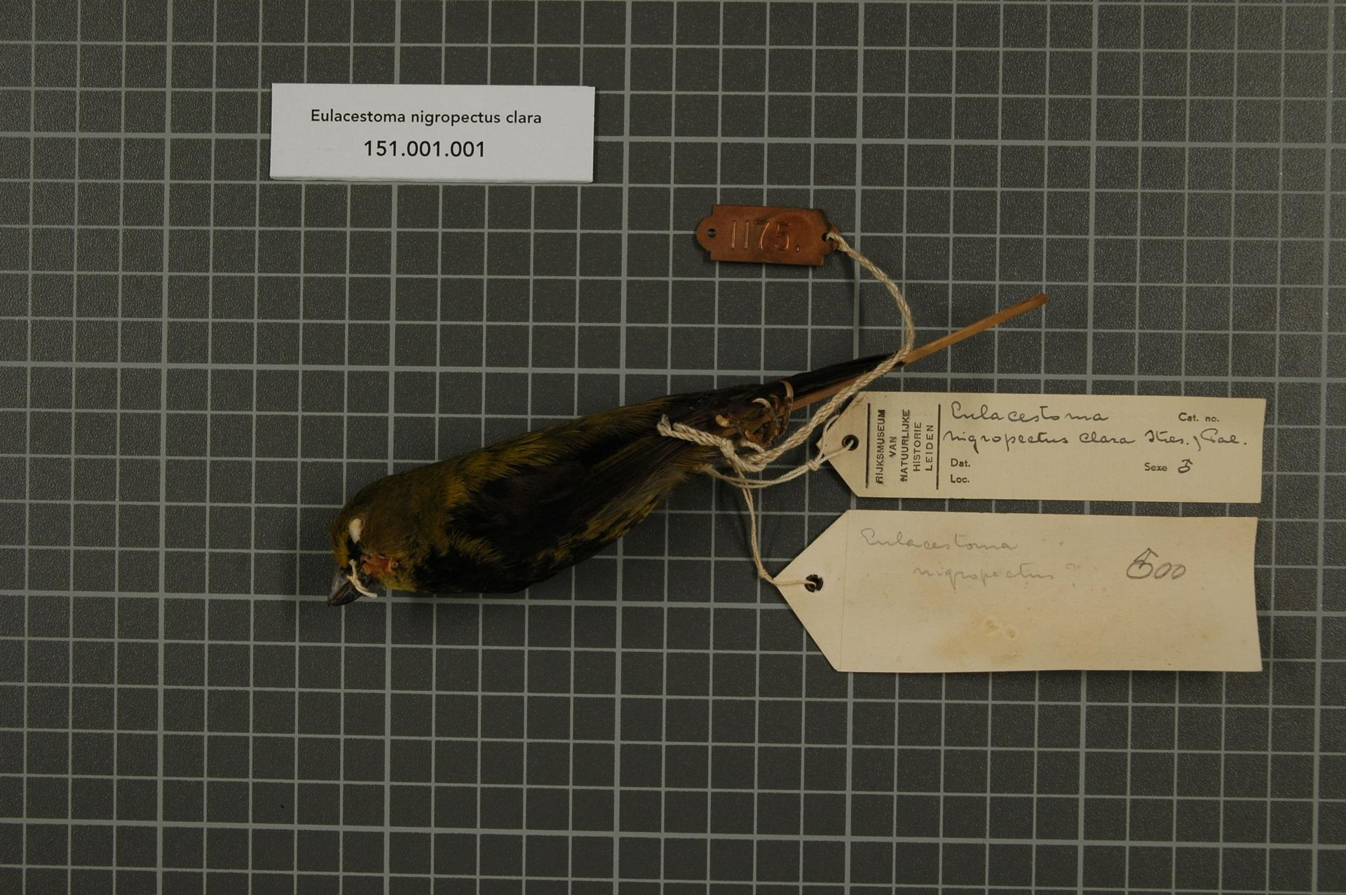 Eulacestoma nigropectus clara Stresemann and Paludan, 1934